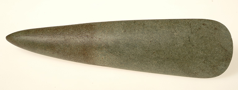 Hache polie en serpentine, provenant de Basse Bretagne, à flancs aplatis, bords ronds, talon en pointe et tranchant très marqué en arc.